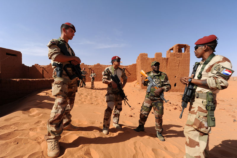 Fort de Madama - Niger, discussions entre paras du 3e RPIMA et militaires du 24e bataillon interarmes